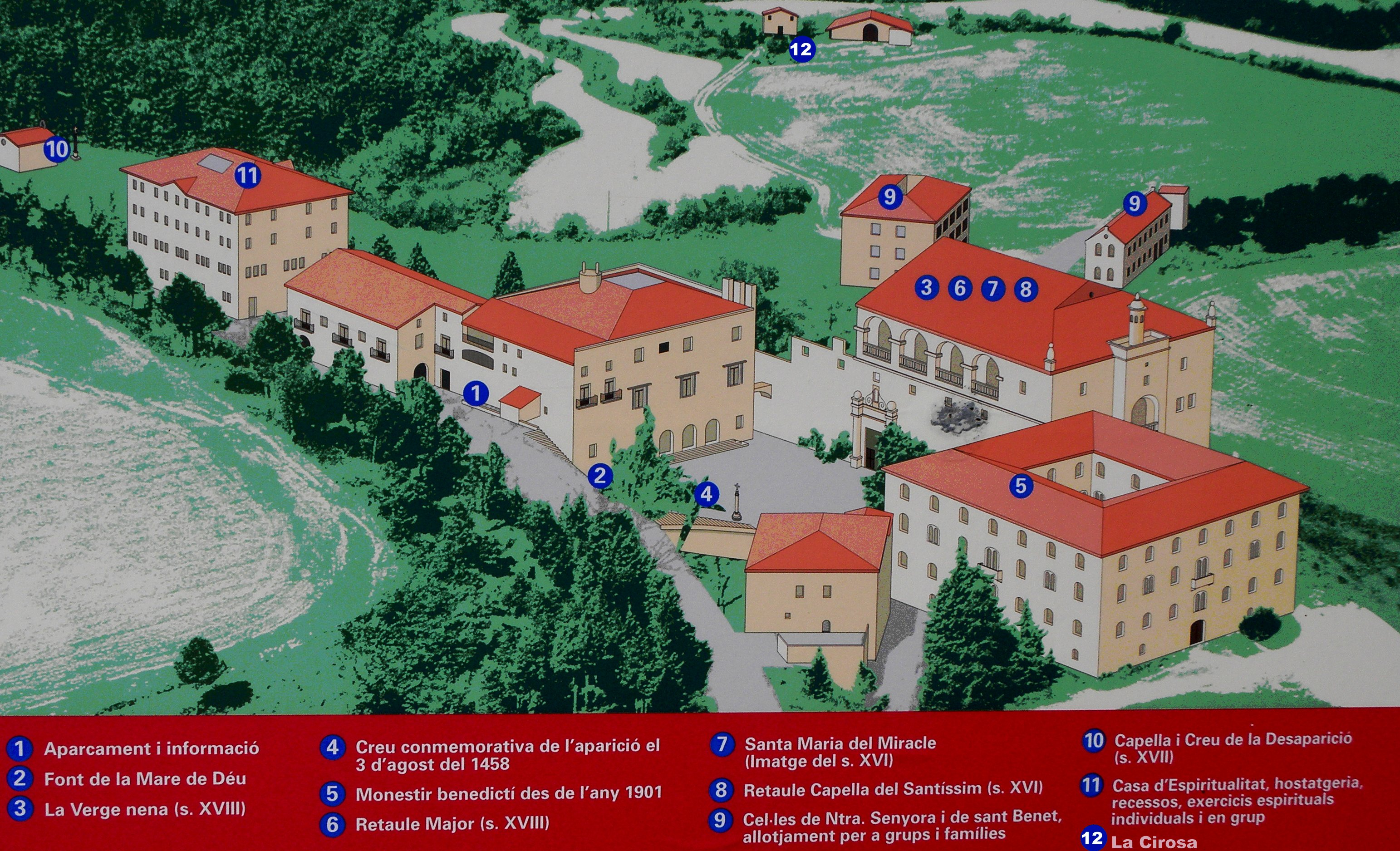 Croquis de les edificacions que conformen el nucli d'El Miracle (Riner, Solsonès).